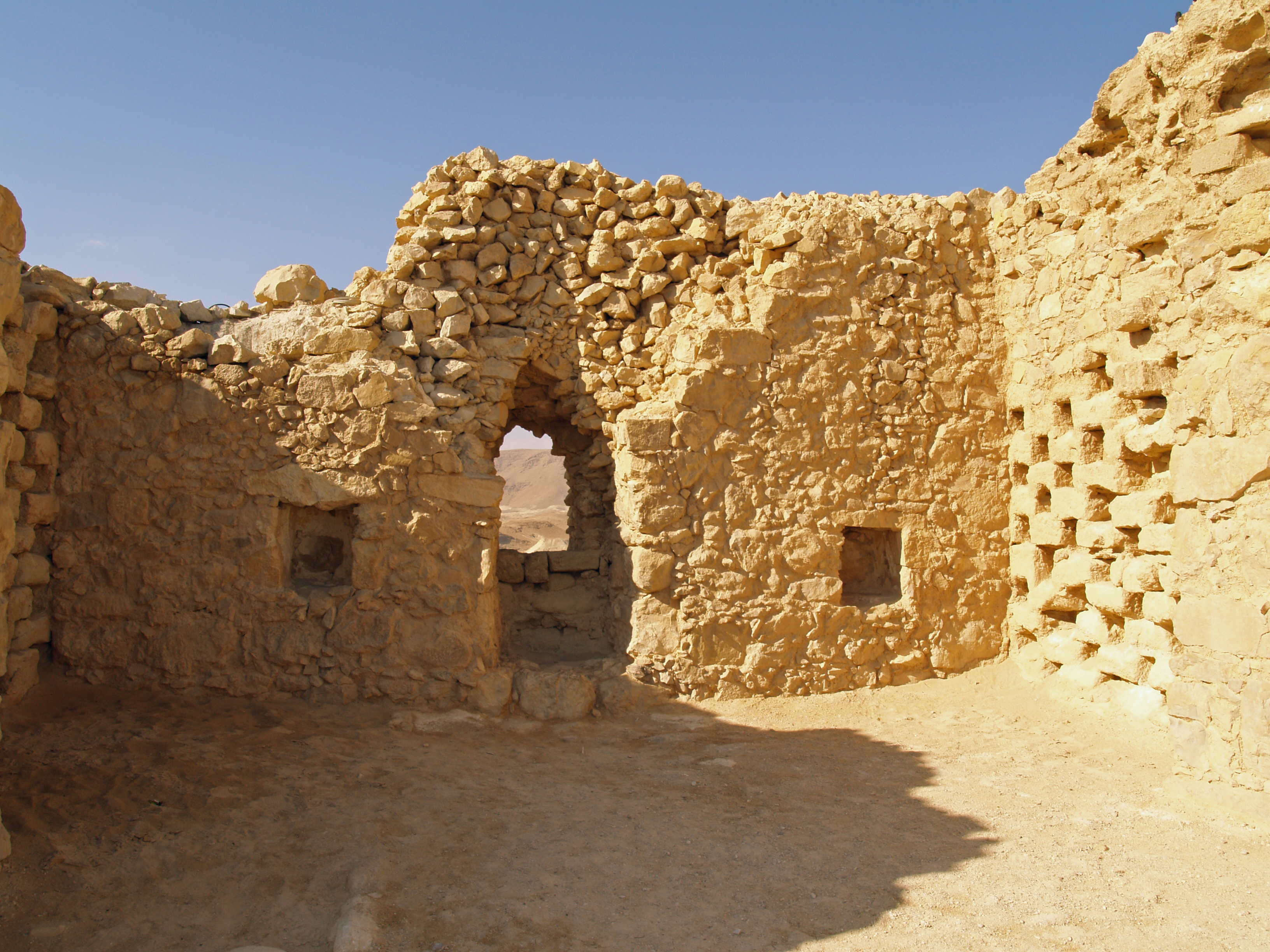 Masada room